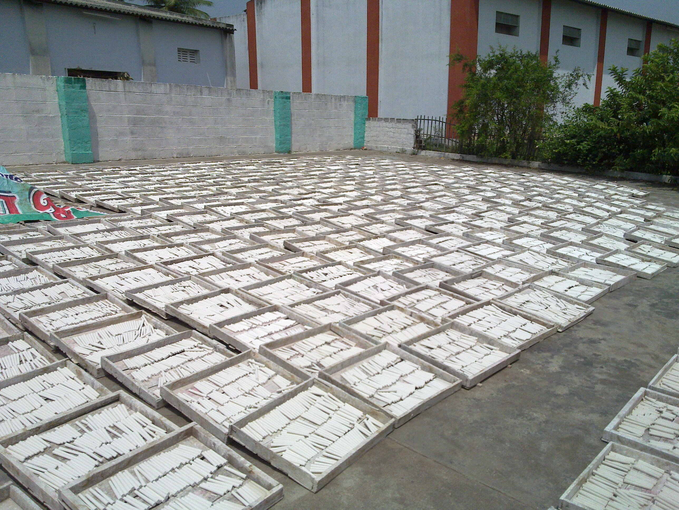 சுண்ணக்கட்டிகளை உலர வைத்தல்